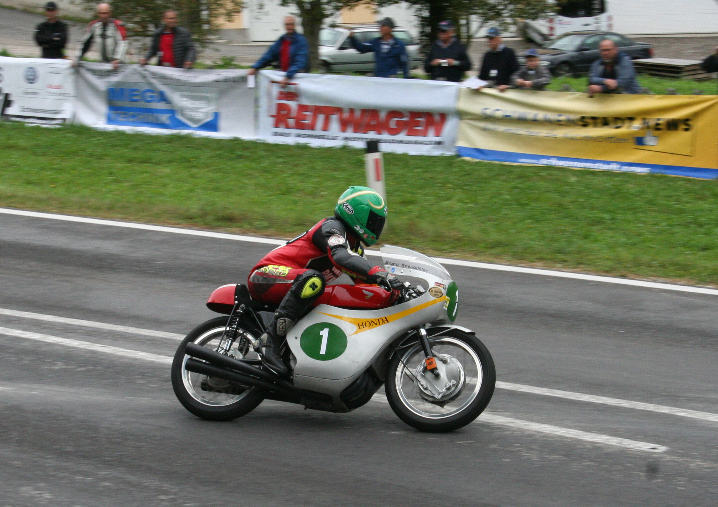 Bruno Kneubühler, auf einer Honda RC 163 R, Baujahr 1963 (247 ccm, 45 PS), beim Oldtimer Grand Prix in Schwanenstadt, Oberösterreich, am 18. September 2016